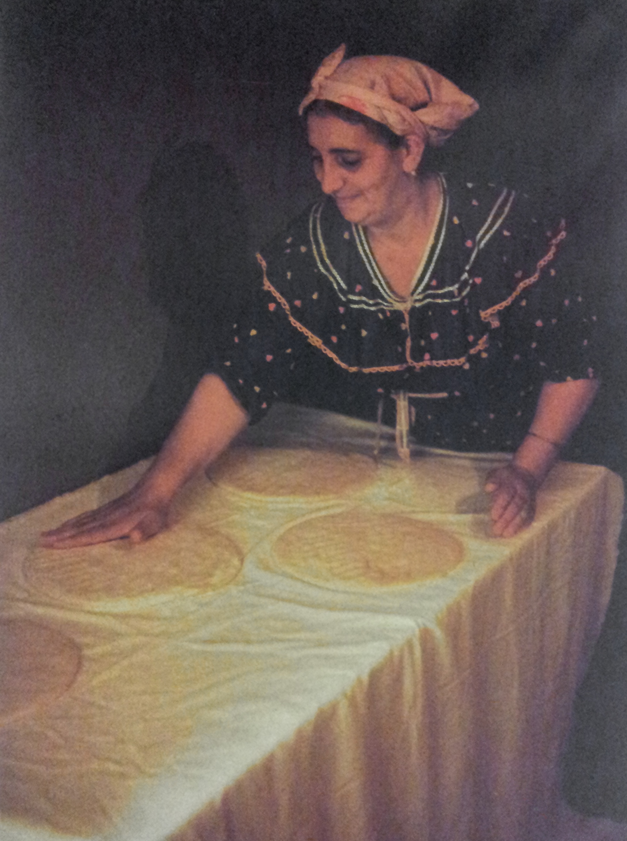 Cuisine algérienne : Préparation de la galette de blé spécialité kabyle, à Ait Hichem